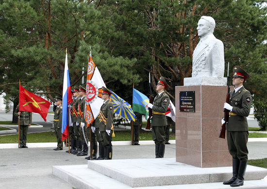 Тюменское высшее военно-инженерное командное училище. Торжественное мероприятие открытия мемориала маршалу инженерных войск А.И. Прошлякову